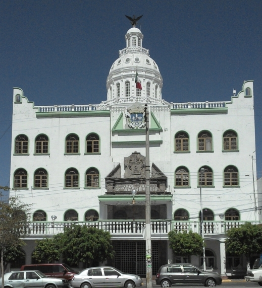 Municipal